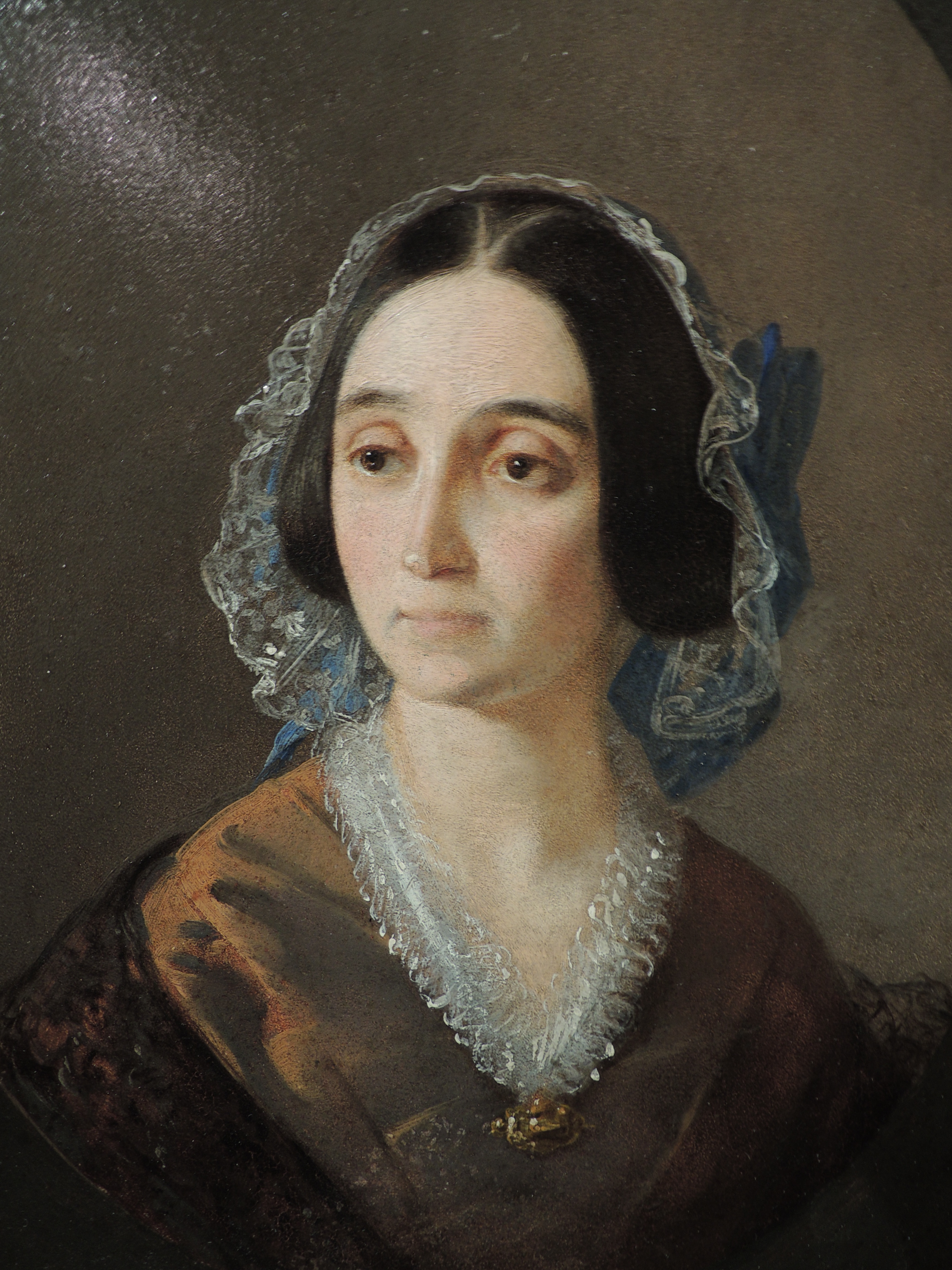 Портрет Екатерины Сергеевны Шереметевой (1813-1890), жены Алексея Васильевича Шереметьева (1800-1857), дочери Сергея Васильевича Шереметева (1786—1835). Художник И. Макаров. ГИМ. Картон, масло. Иконографическое определение Н.В. Архангельской